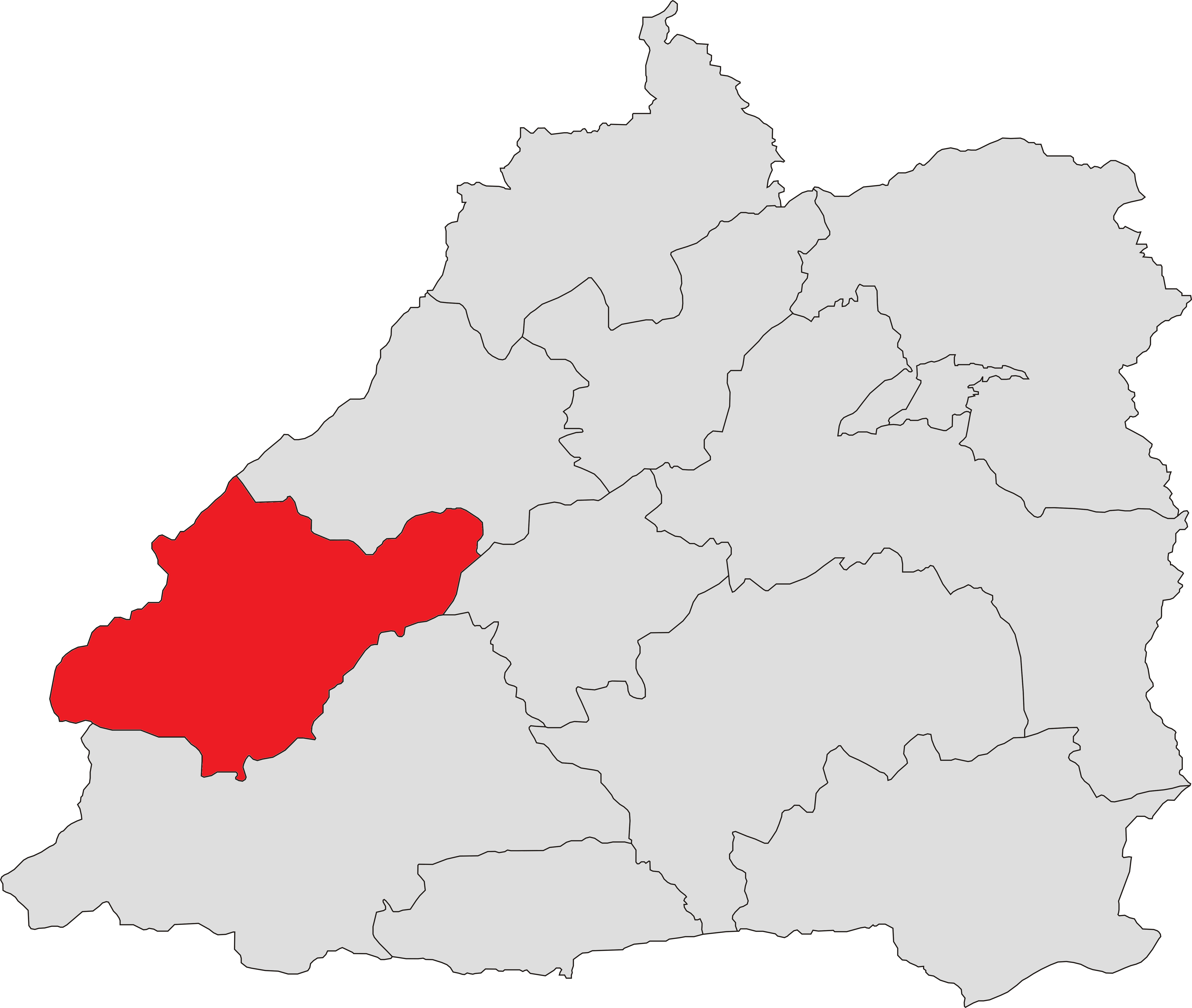 中文（中国大陆）: 芒市西山乡位置图